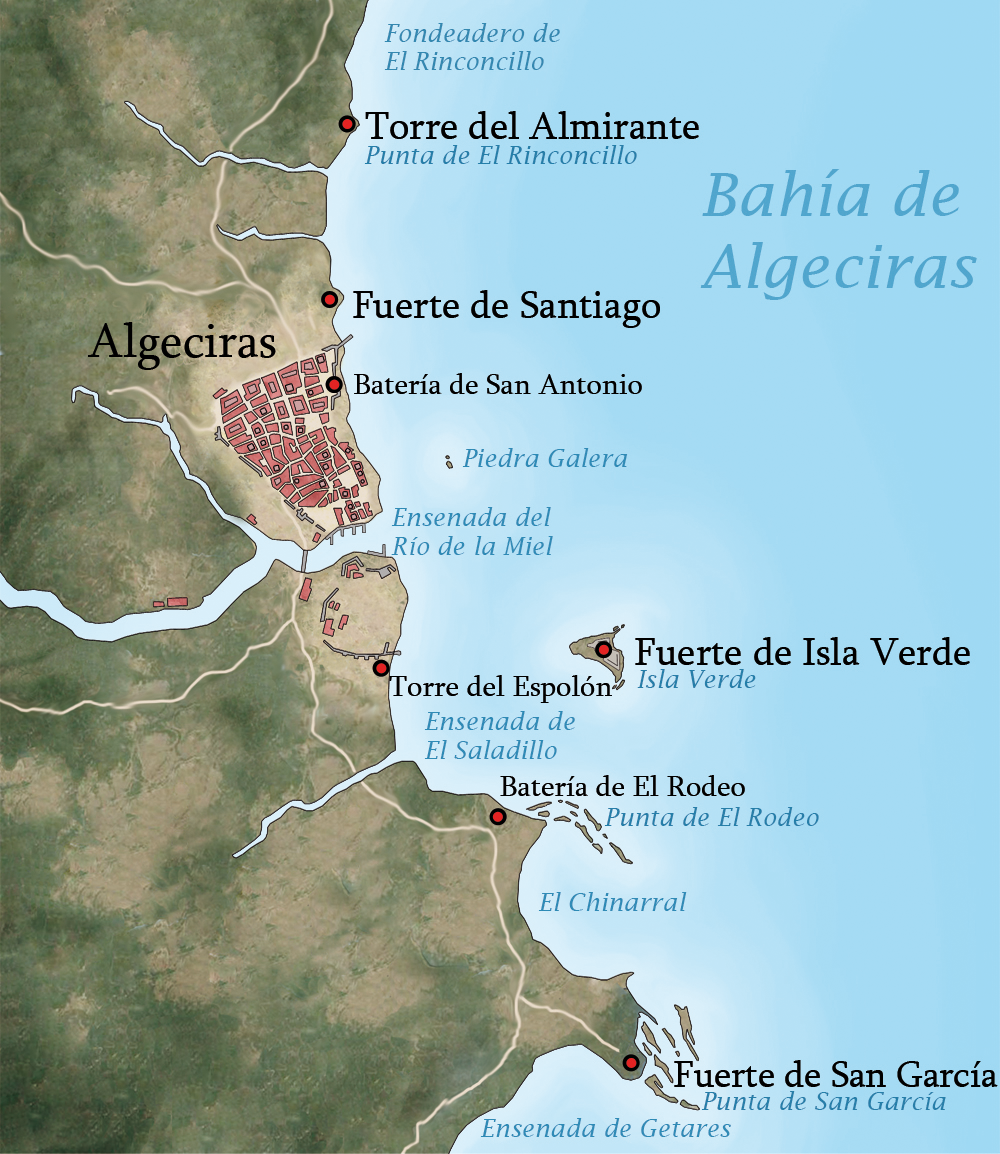 Mapa de la costa de Algeciras con los fuertes costeros en 1801.